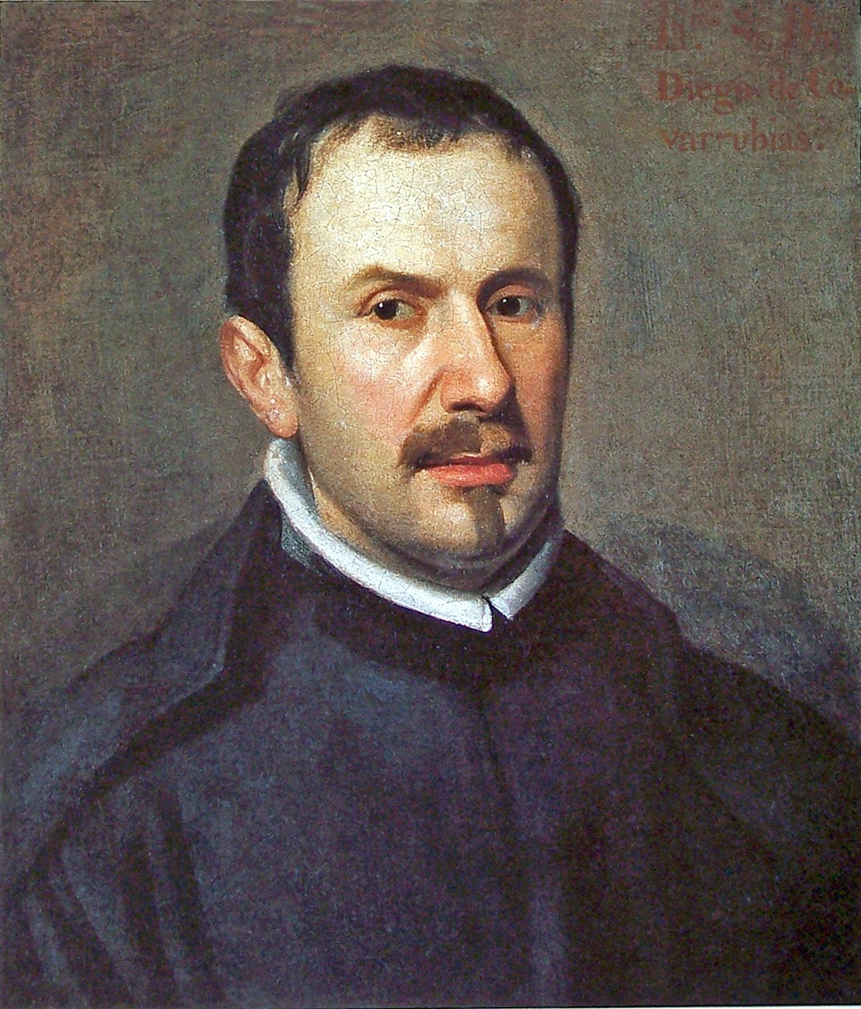 Retrato del sacerdote, escitor y humanista español Lorenzo van der Hamen (1589-1664), que fue hermano del pintor Juan van der Hamen, autor de esta obra.